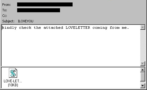 Loveletter